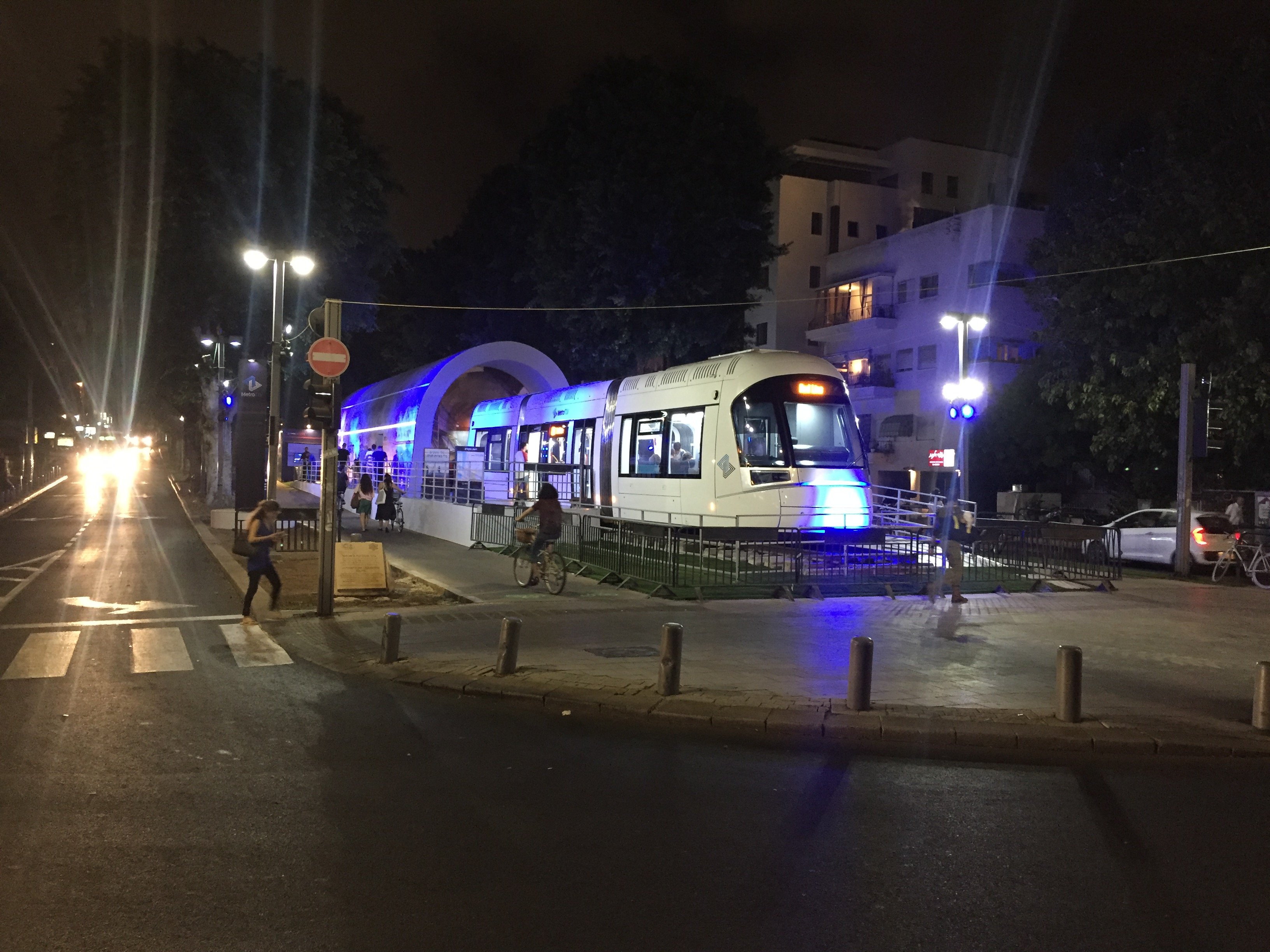 2017, דגם הרכבת הקלה כפי שהוצב בשדרות רוטשילד בתל אביב